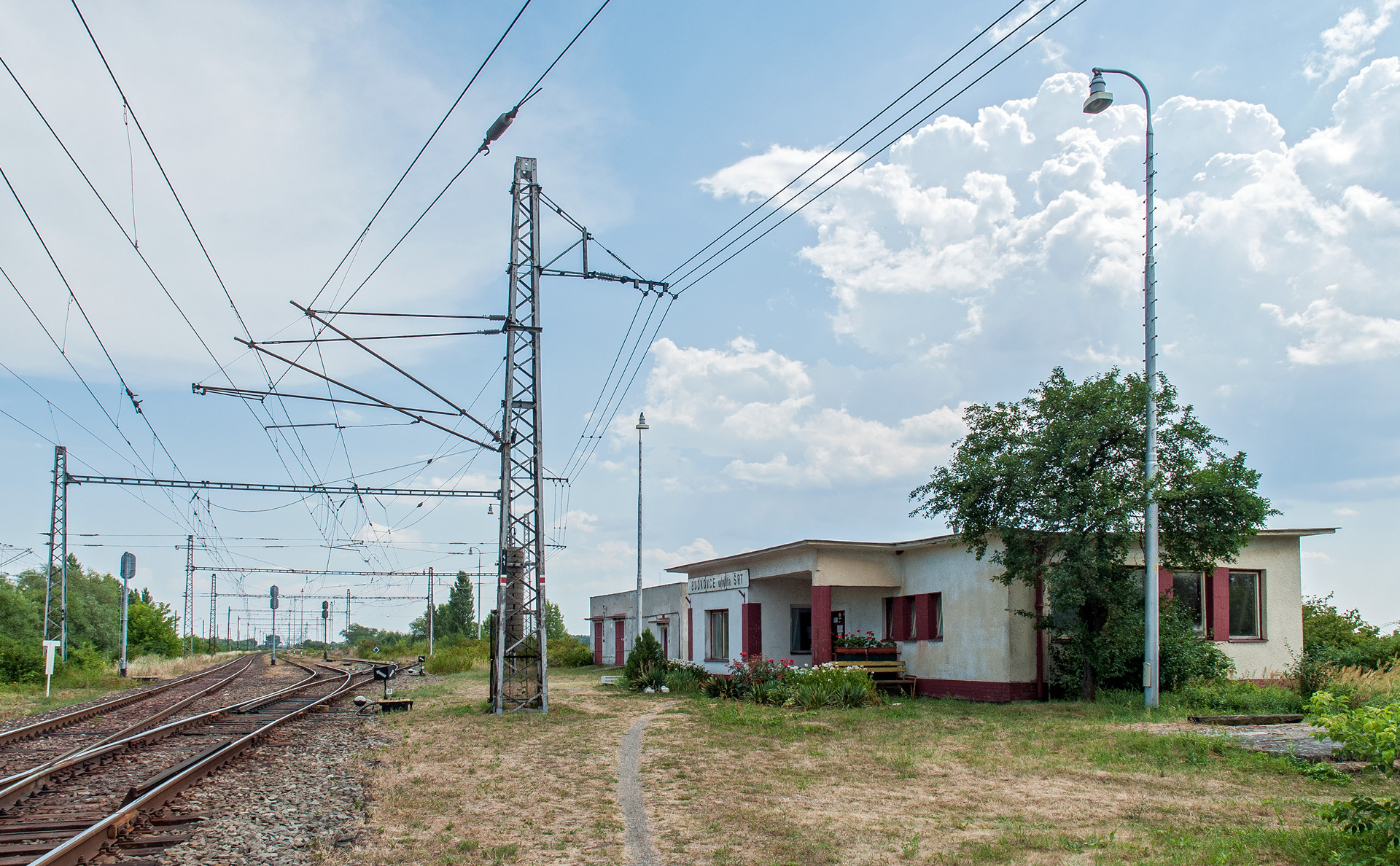 Širokorozchodná výhybna Budkovce na trati Užhorod - Haniska pri Košiciach